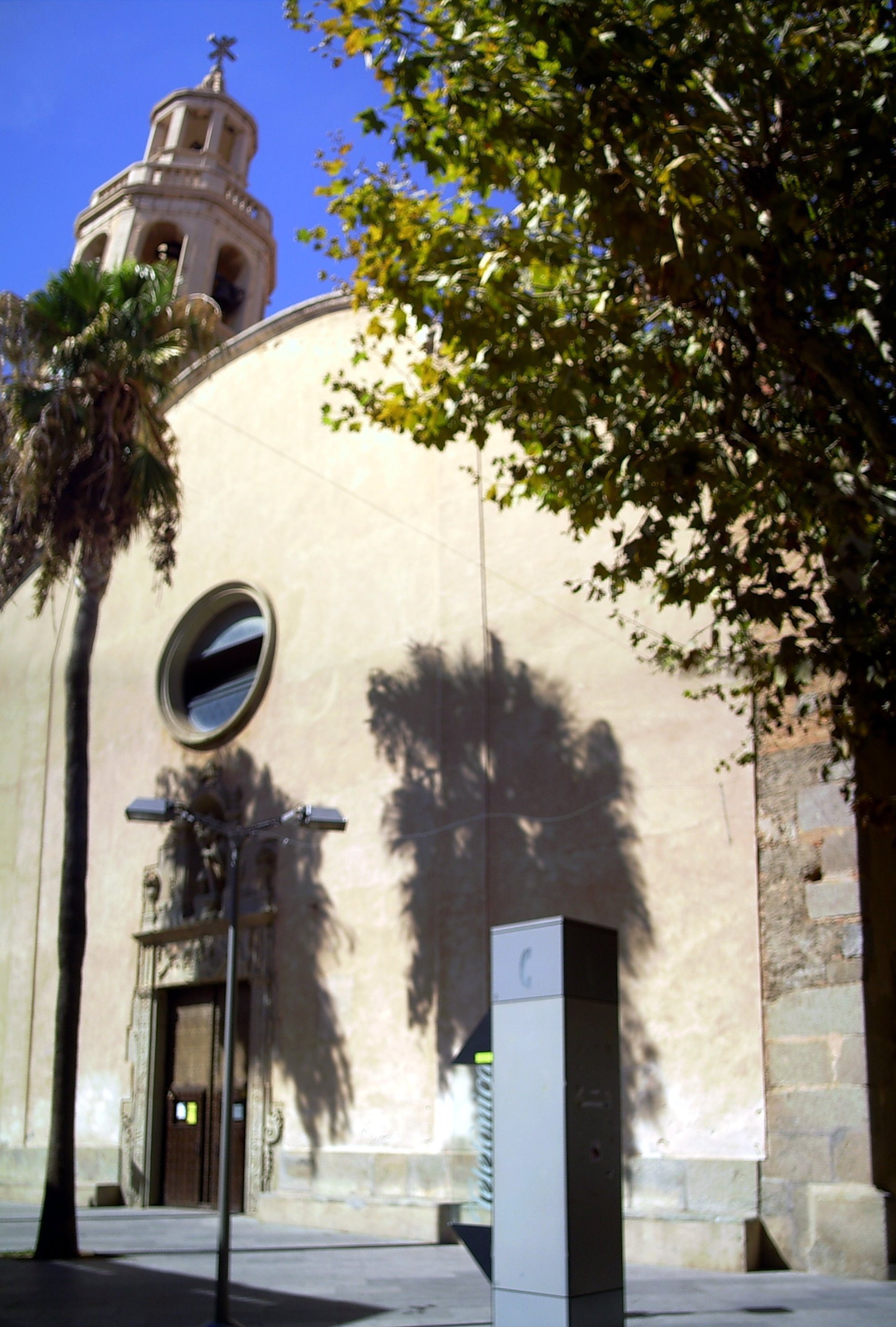 Església de Sant Cristòfol, iniciada el 1798 i acabada el 1854, a Premià de Mar, comarca del Maresme, (Catalunya). Imatge composta amb dues fotografies, unides horitzontalment, amb GIMP.